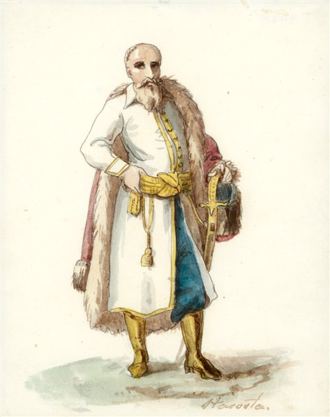 Беларуская (тарашкевіца): Староста Вялікага Княства Літоўскага